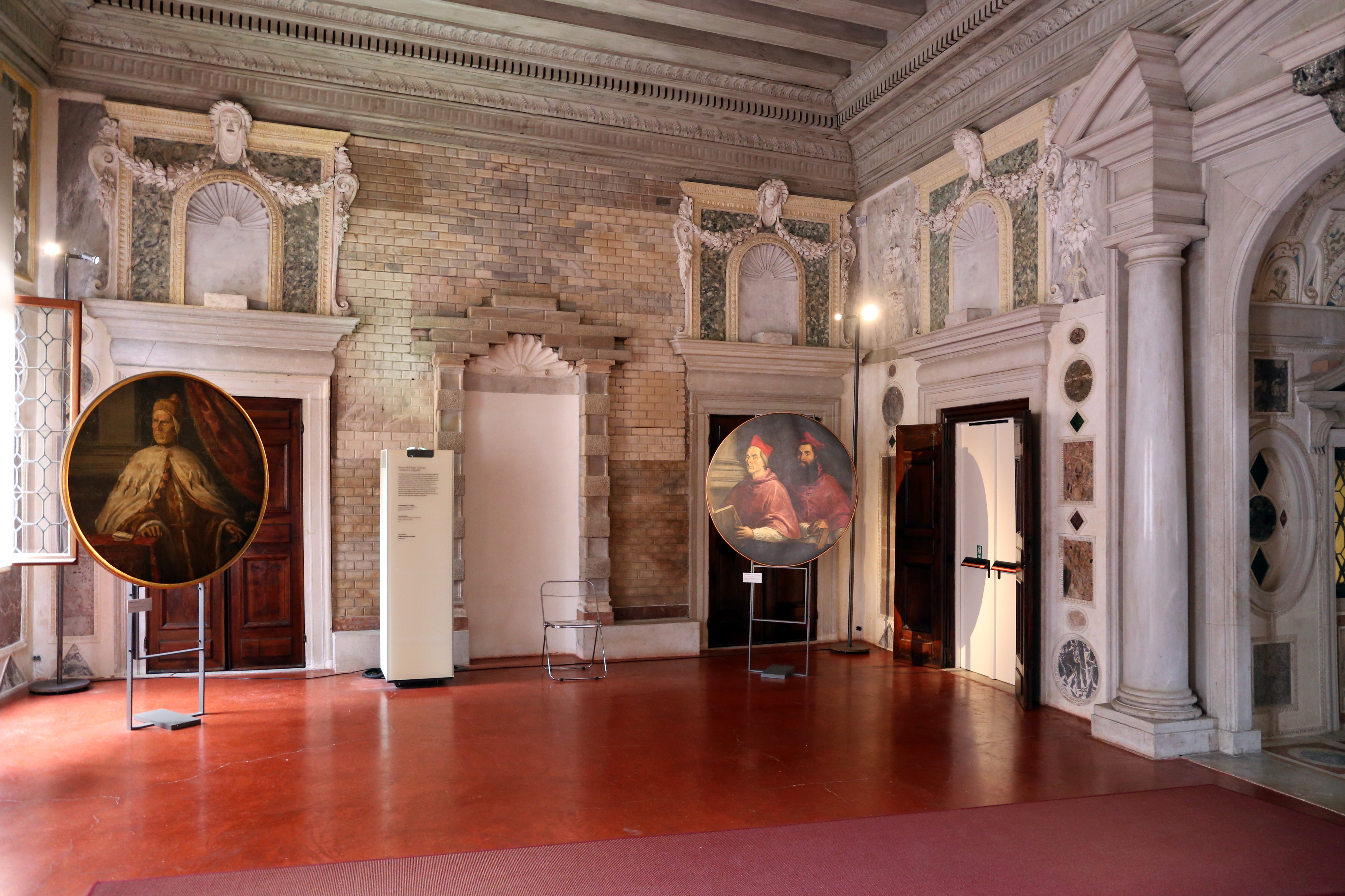 Palazzo Grimani (Castello) This is a photo of a monument which is part of cultural heritage of Italy.